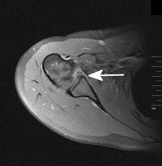 MRT der Schulter. Der Pfeil zeigt auf einen Riß im ventralen Glenoid also in der vorderen Gelenklippe. Die ist eine typische Verletzung nach Schulterluxation. Bankart-Läsion.